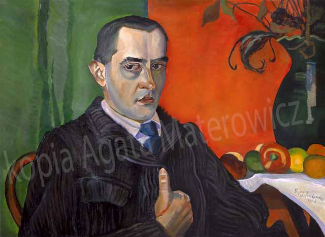 kopia, Autoportret, 1913, Witkacy namalowana przez Agata Materowicz